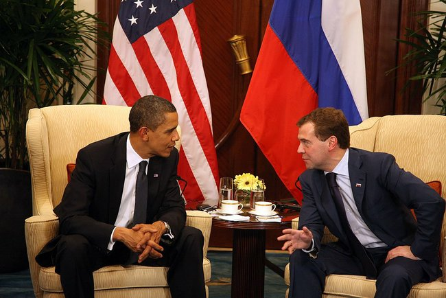 С Президентом Соединённых Штатов Америки Бараком Обамой.